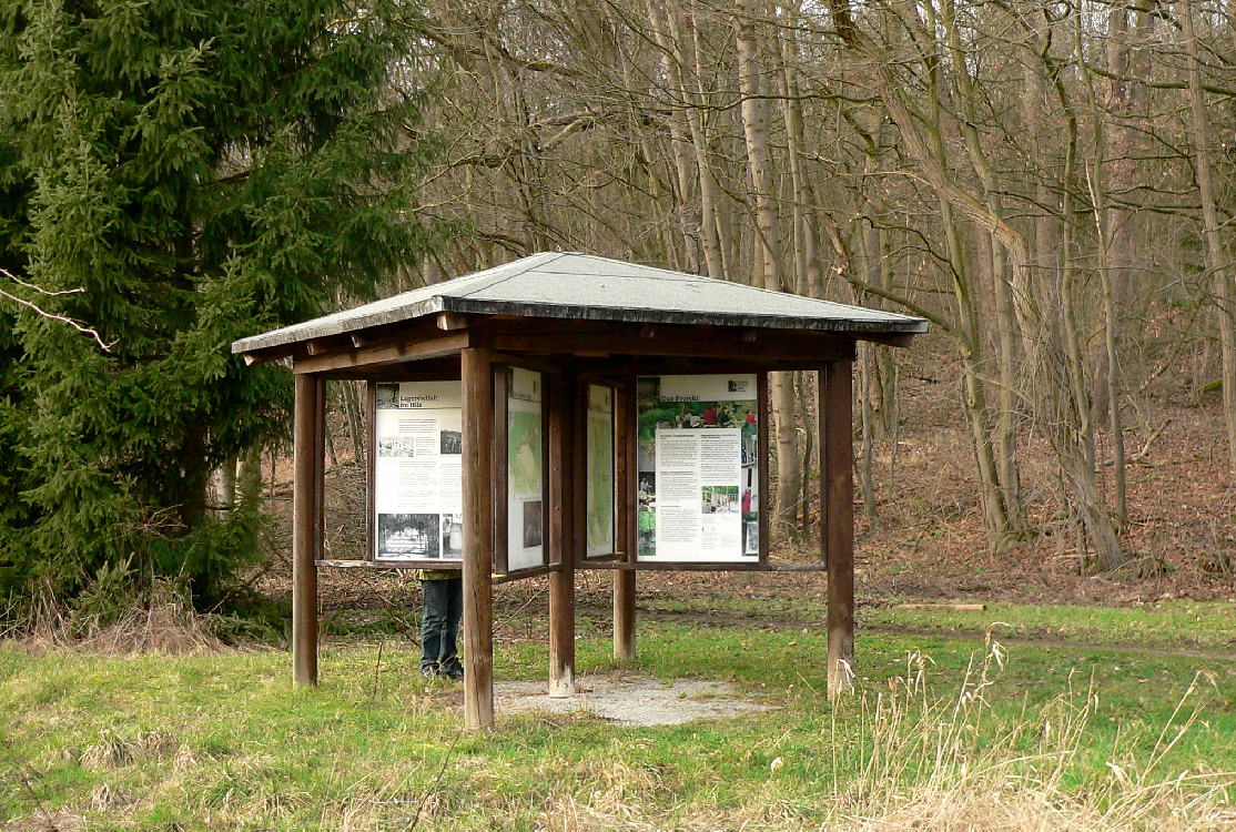 Lenner Lager, Infopavillon an der B 64